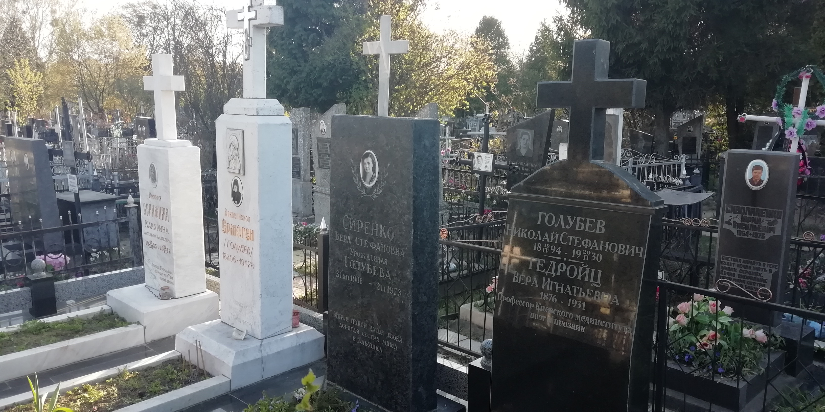 Могила В.Гедройц на Корчуватском кладбище, Киев, Апрель 2020 \ Gedroiz tomb at Kyiv Korchuvatske cemetry , April 2020